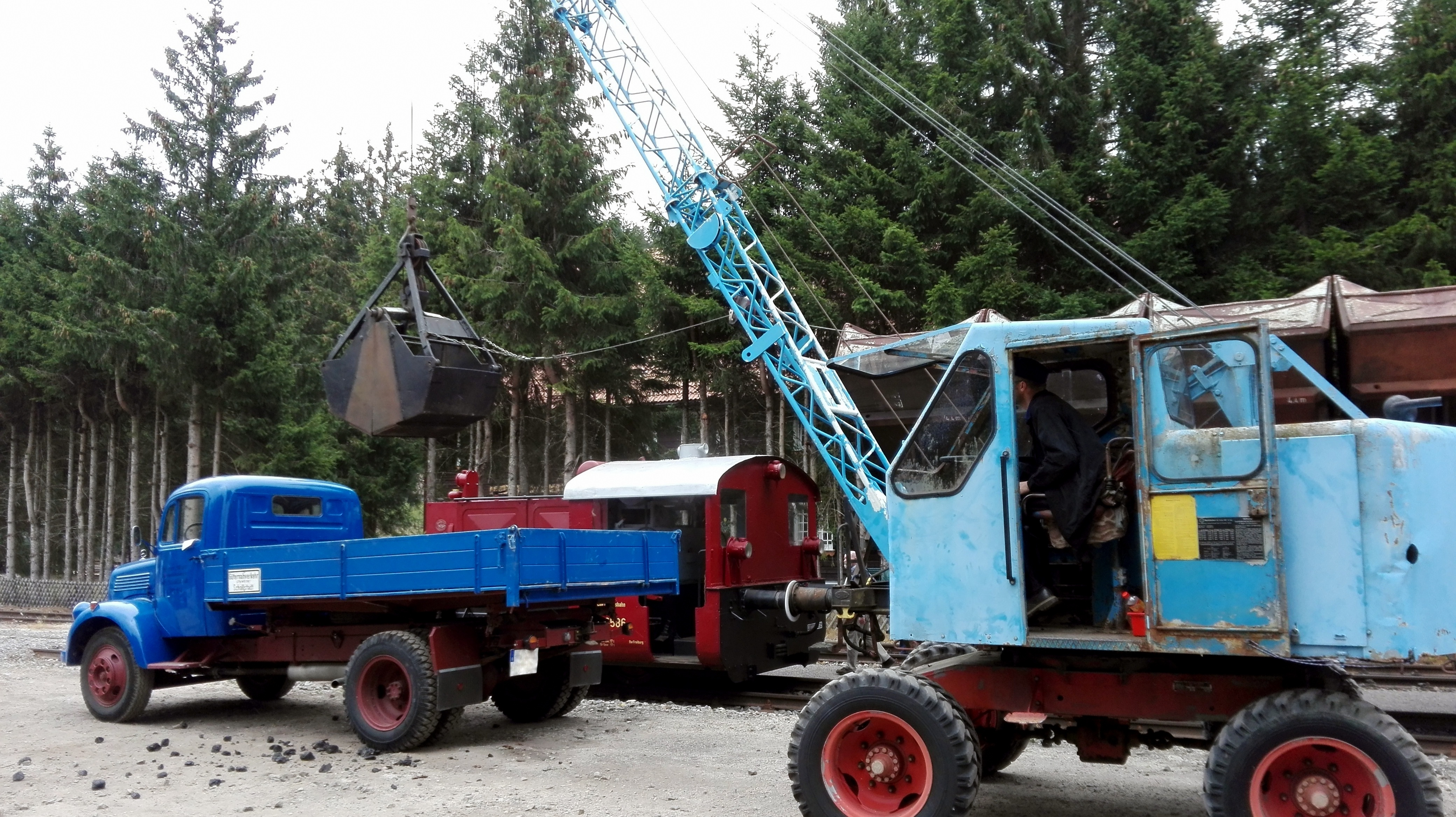 Das Bild zeigt die Kohleverladung beim Bahnhofsfest 2015.